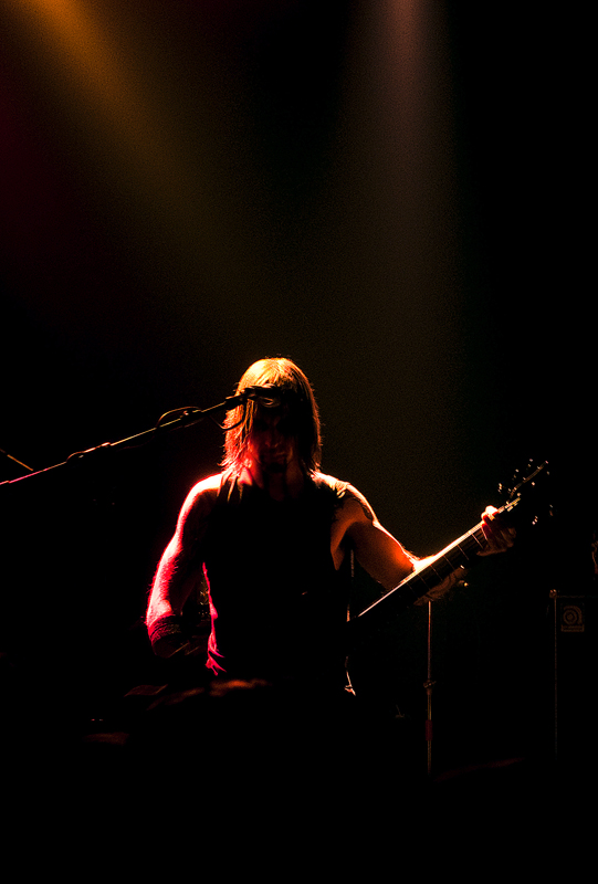 Vidres a la Sang, 6-Març-2010 KGB (Barcelona)